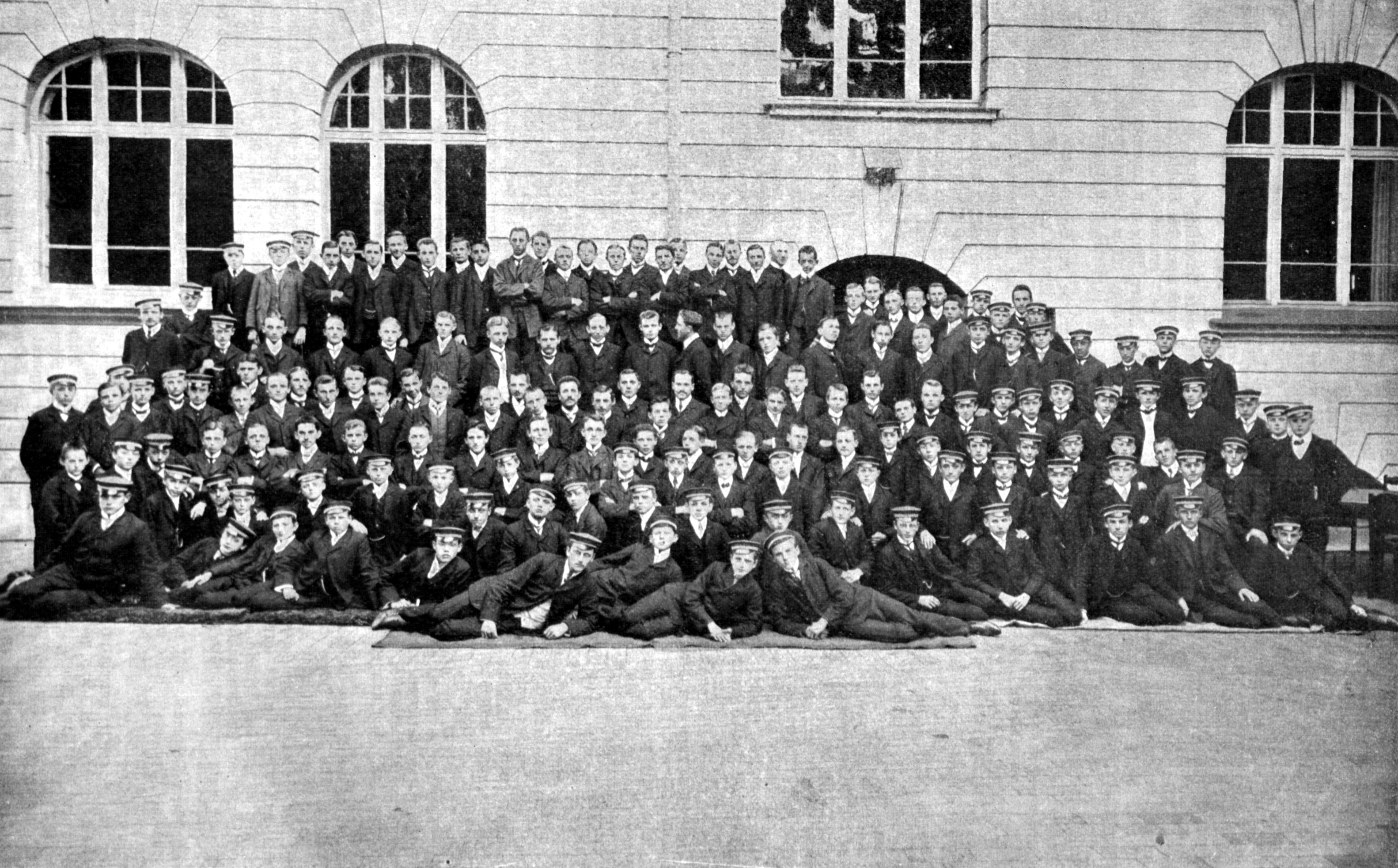 Die Zöglingsschar des Lübecker Schullehrer-Seminars Michaelis 1907.